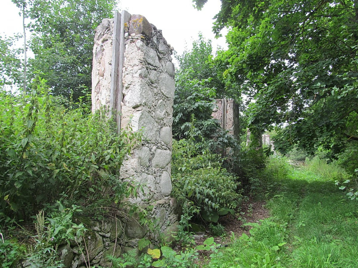 Забалоцце (Перабродскі сельсавет). Сядзіба Дмахоўскіх